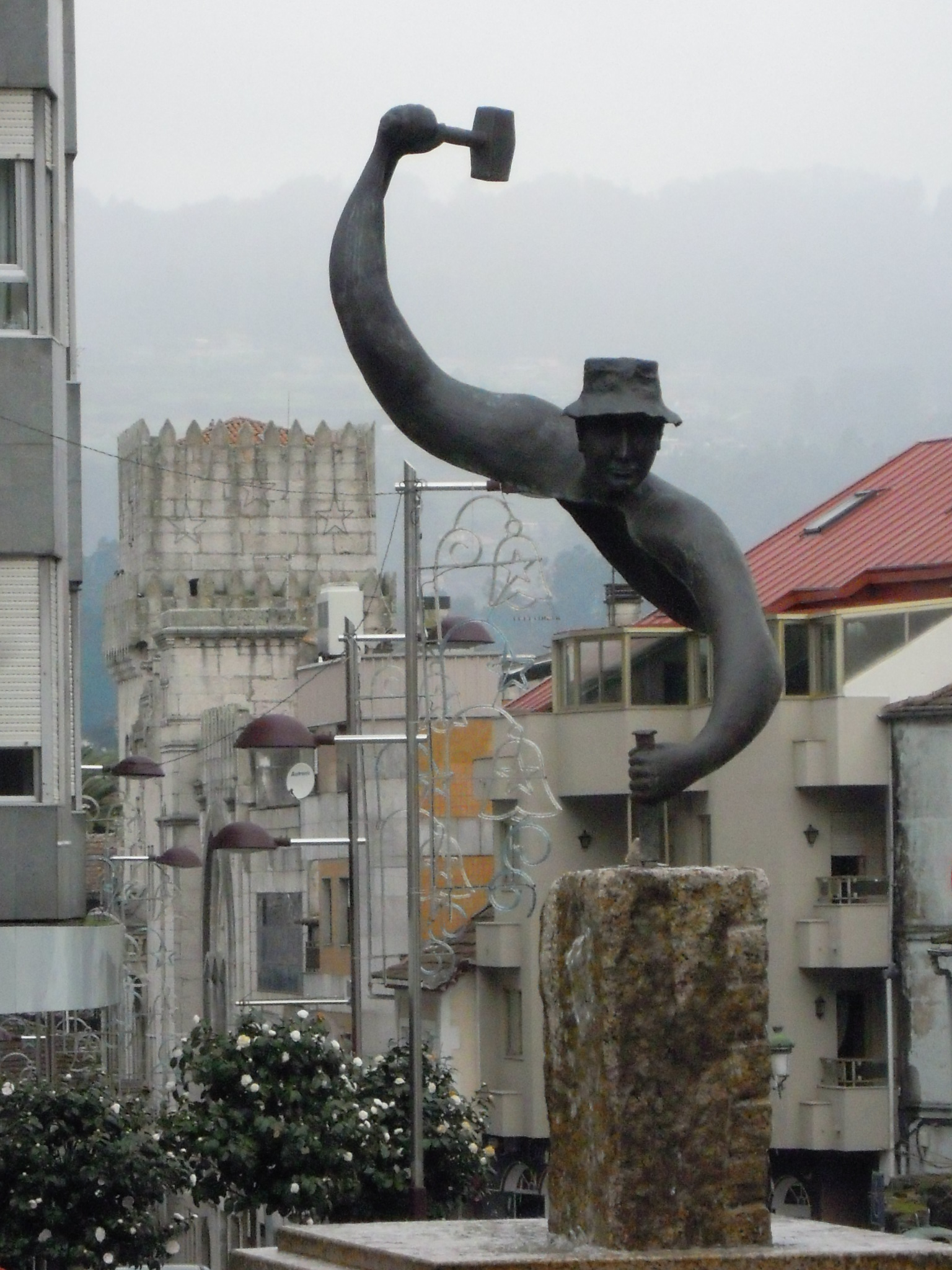 Escultura de bronce de Suso Balado en homenaxe aos canteiros, na rotonda da rúa de Antonio Palacios, no centro urbano do Porriño.